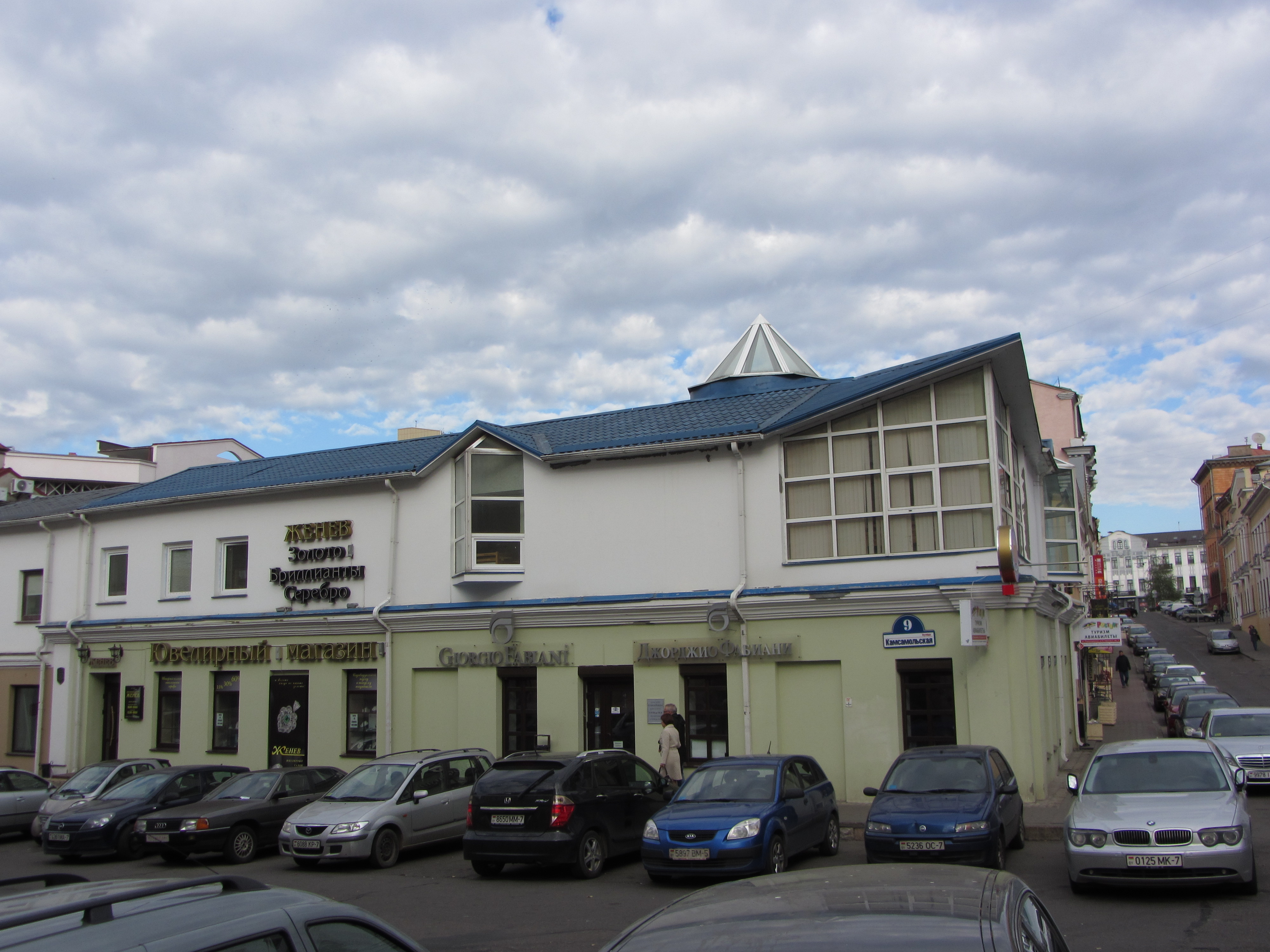 Беларуская (тарашкевіца): Камсамольская 9, Менск